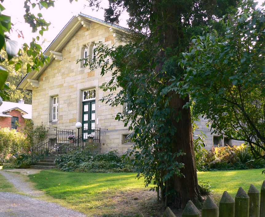 Ehemaliges Jagdschloss und ehemals königliches Forsthaus